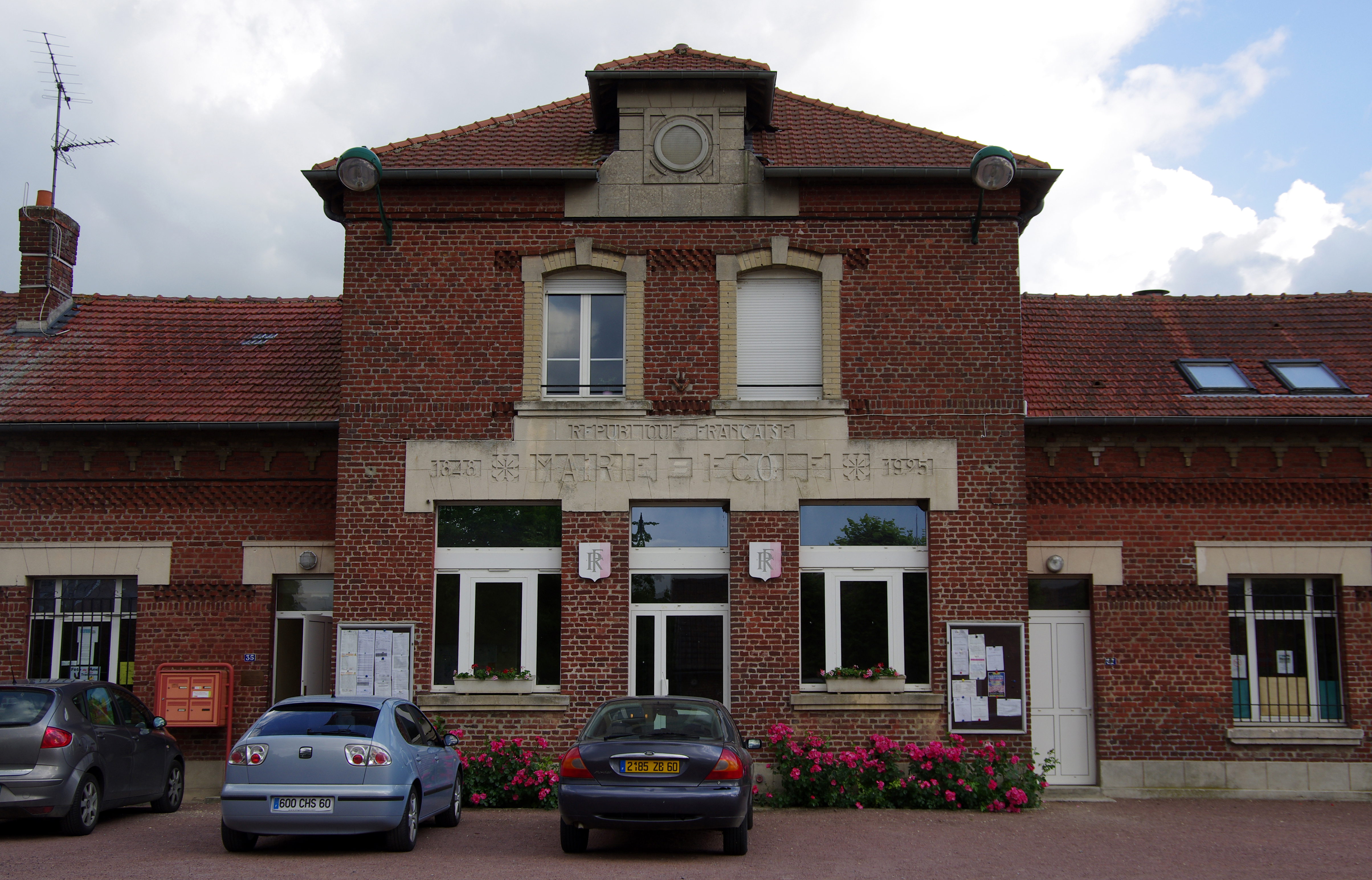 Amy (Oise, France) - La mairie. .